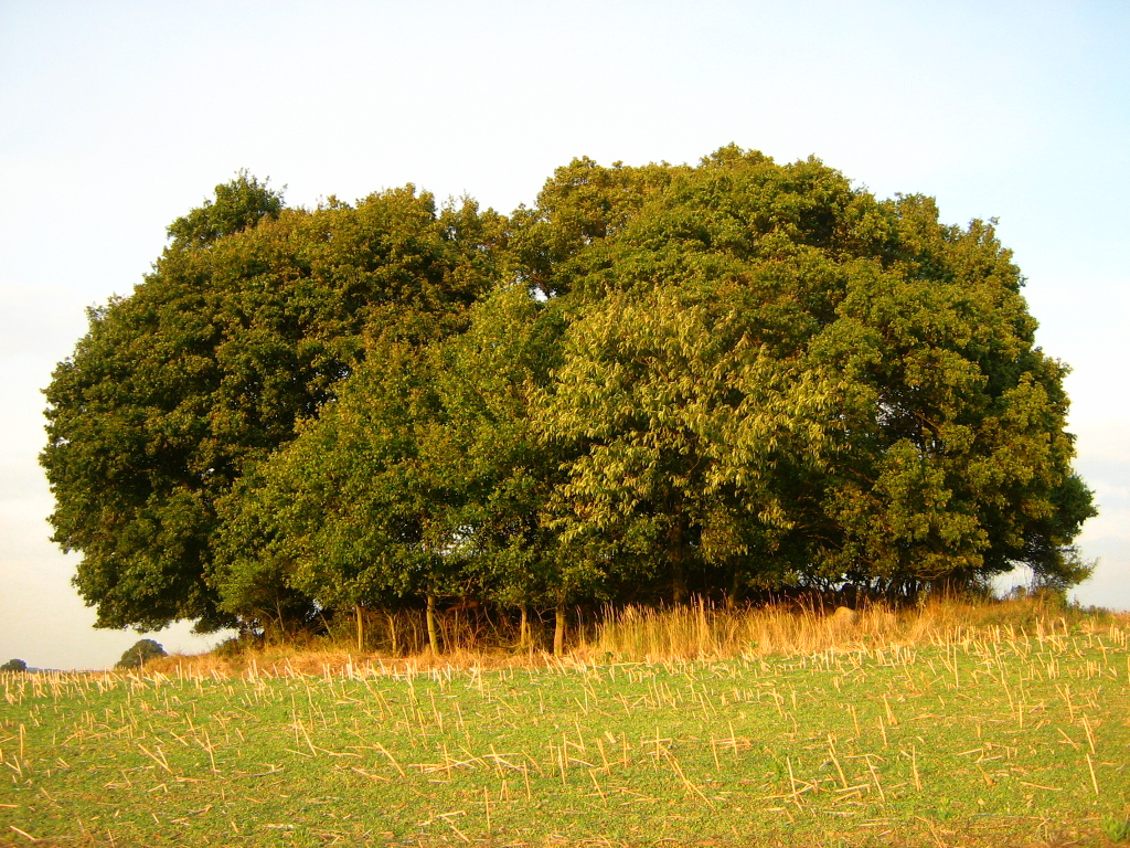 Großsteingrab „Gnewitz 6“ in der Feldmark der Gemeinde Gnewitz, (Landkreis Bad Doberan, Mecklenburg). Das Grab ist komplett zerstört. Vorhanden sind nur noch drei Tragsteine, jedoch alle verlagert. Nach dem Ausgrabungsbefund war die Kammerdiele vollständig erhalten. Danach handelte es sich um eine in Ost-West-Richtung orientierte Kammer von 6 x 2 Meter Größe. Die Diele war in vier Abteilungen unterteilt. Von Süden führte ein Gang in die Kammer.[1] 54°4′13.02″N 12°31′37.66″E / 54.0702833°N 12.5271278°E